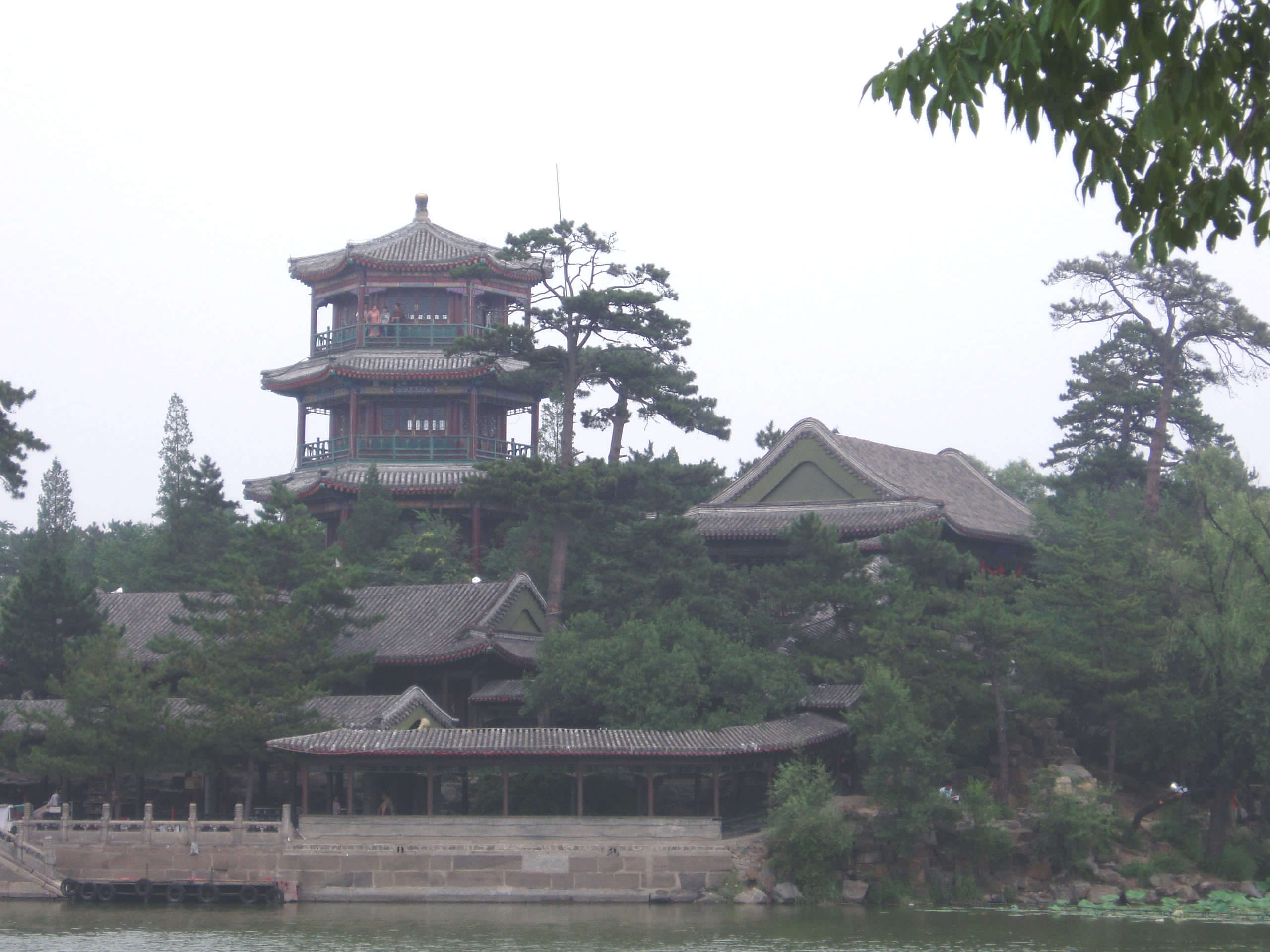 Summer Resort in Chengde